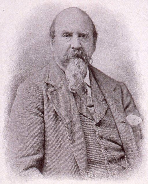 Alfred Touchemolin. Éditeur : Schlaeber Ch (Paris). 1906. Bibliothèque nationale et universitaire de Strasbourg